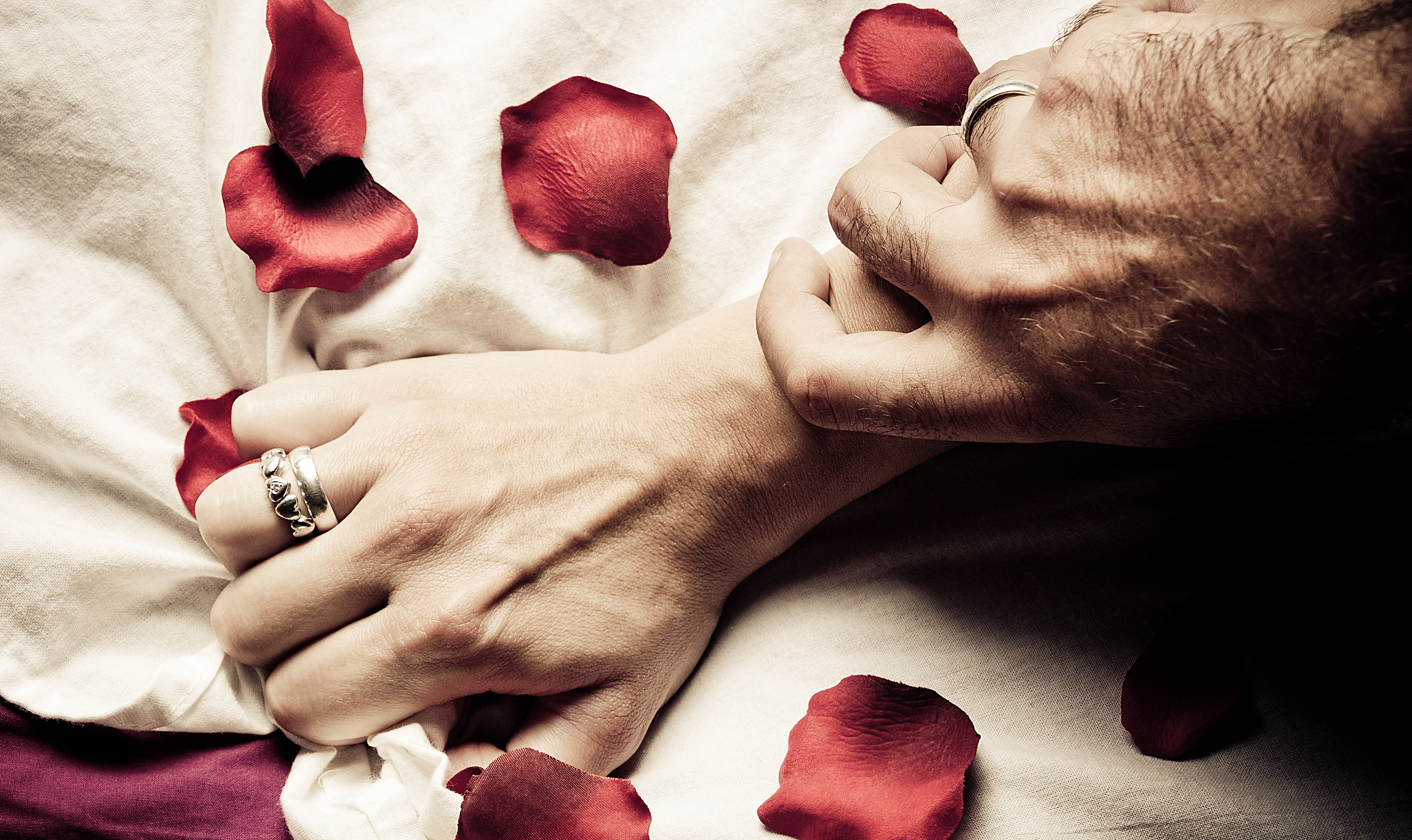 El tema de la semana del grupo Area52 ha sido Pasión y bueno, aquí está mi propuesta.